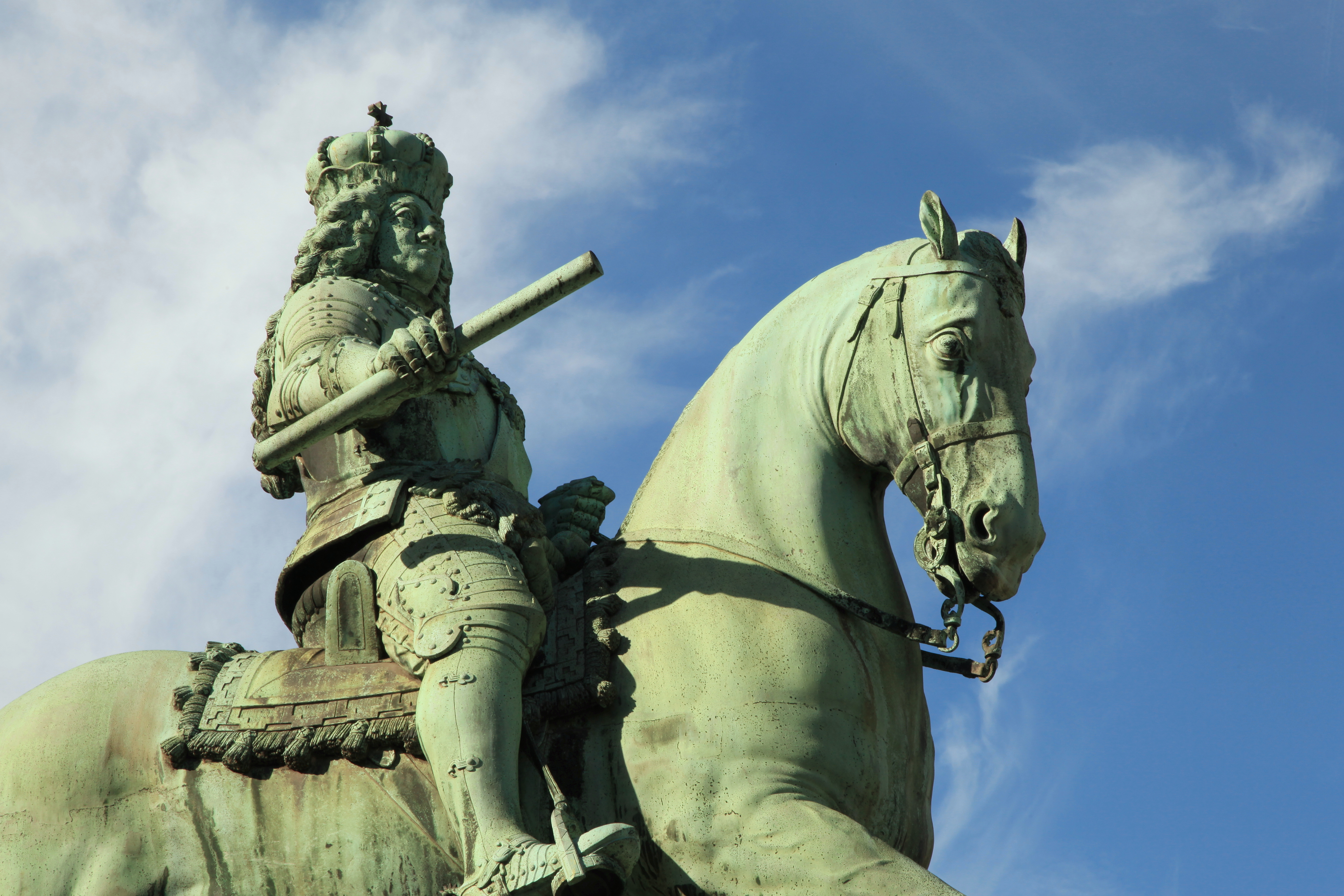 Jan-Wellem-Reiterstandbild auf dem Marktplatz in Düsseldorf